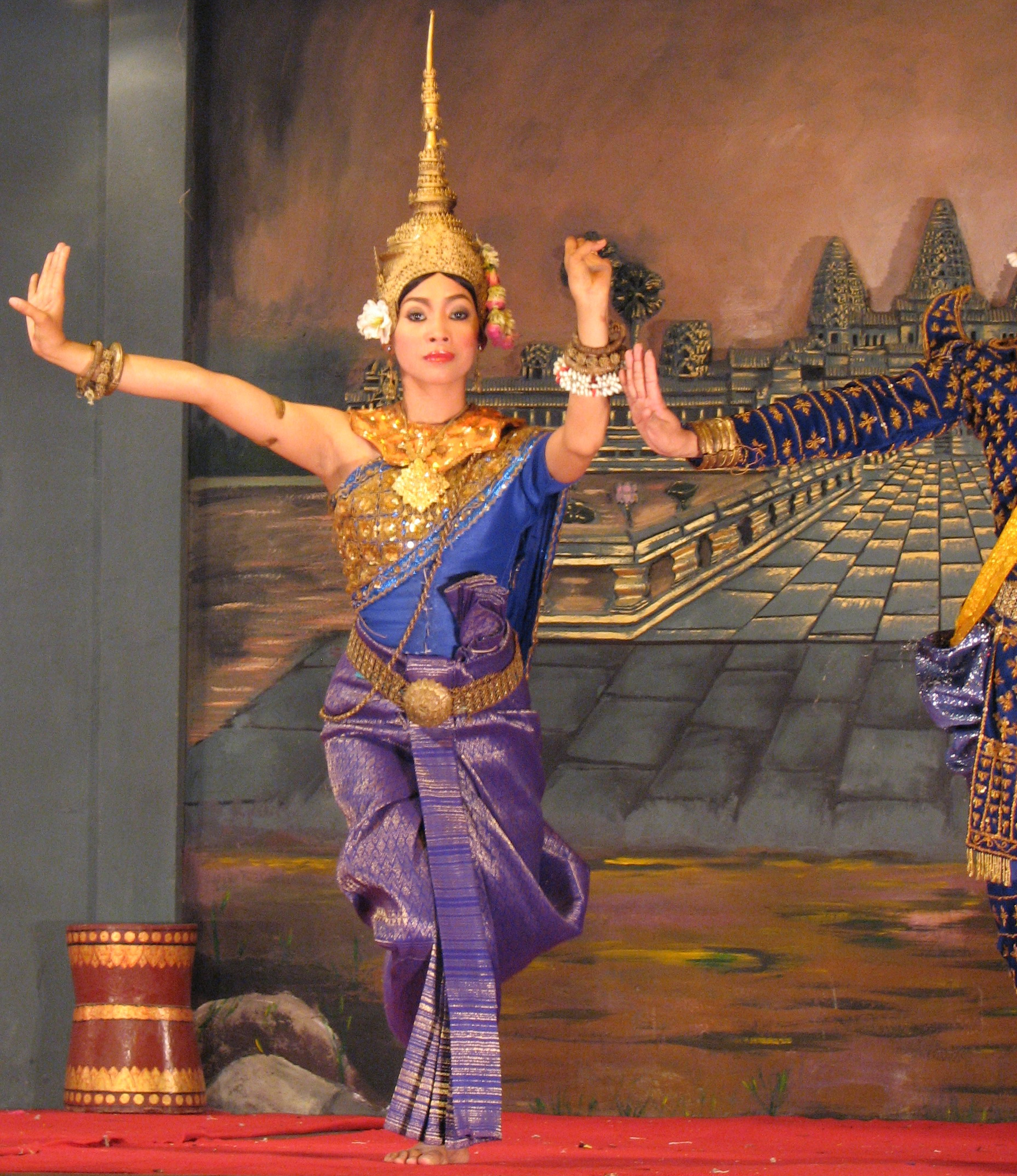 Khmer classical dance performance in Siem Reap, Cambodia.